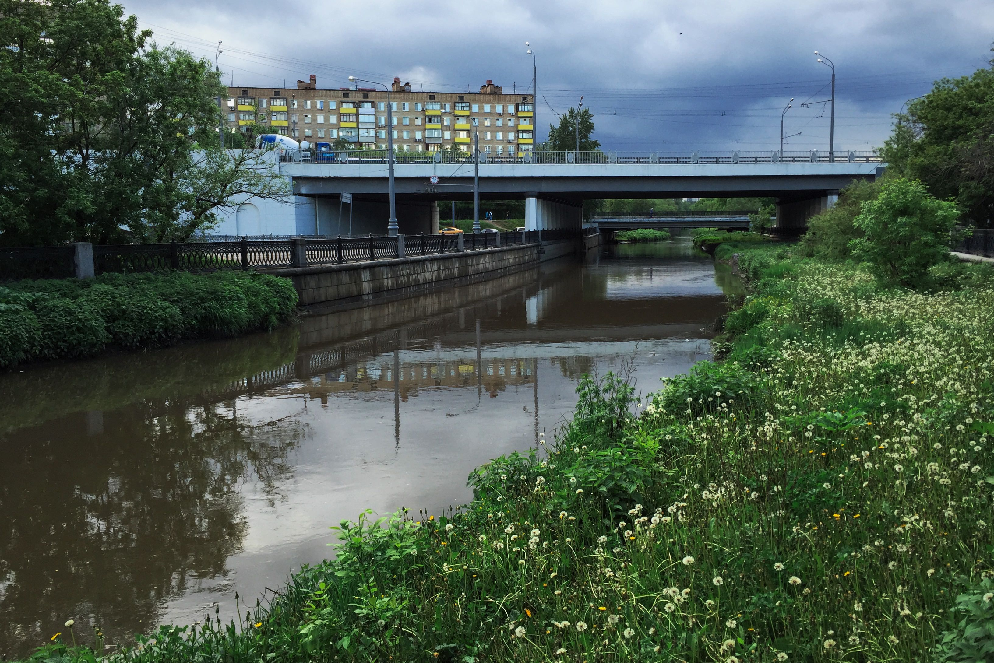 Проспект Мира. Яуза. 2-й Ростокинский мост, 1957, реконструирован в 1979. За ним виден трамвайно-пешеходно-теплотрассный 1-й Ростокинский мост - построен в 1980 году на месте старого Ростокинского моста. Вид из парка Акведук вверх по течению. Кирпичный дом - Мира, 135.